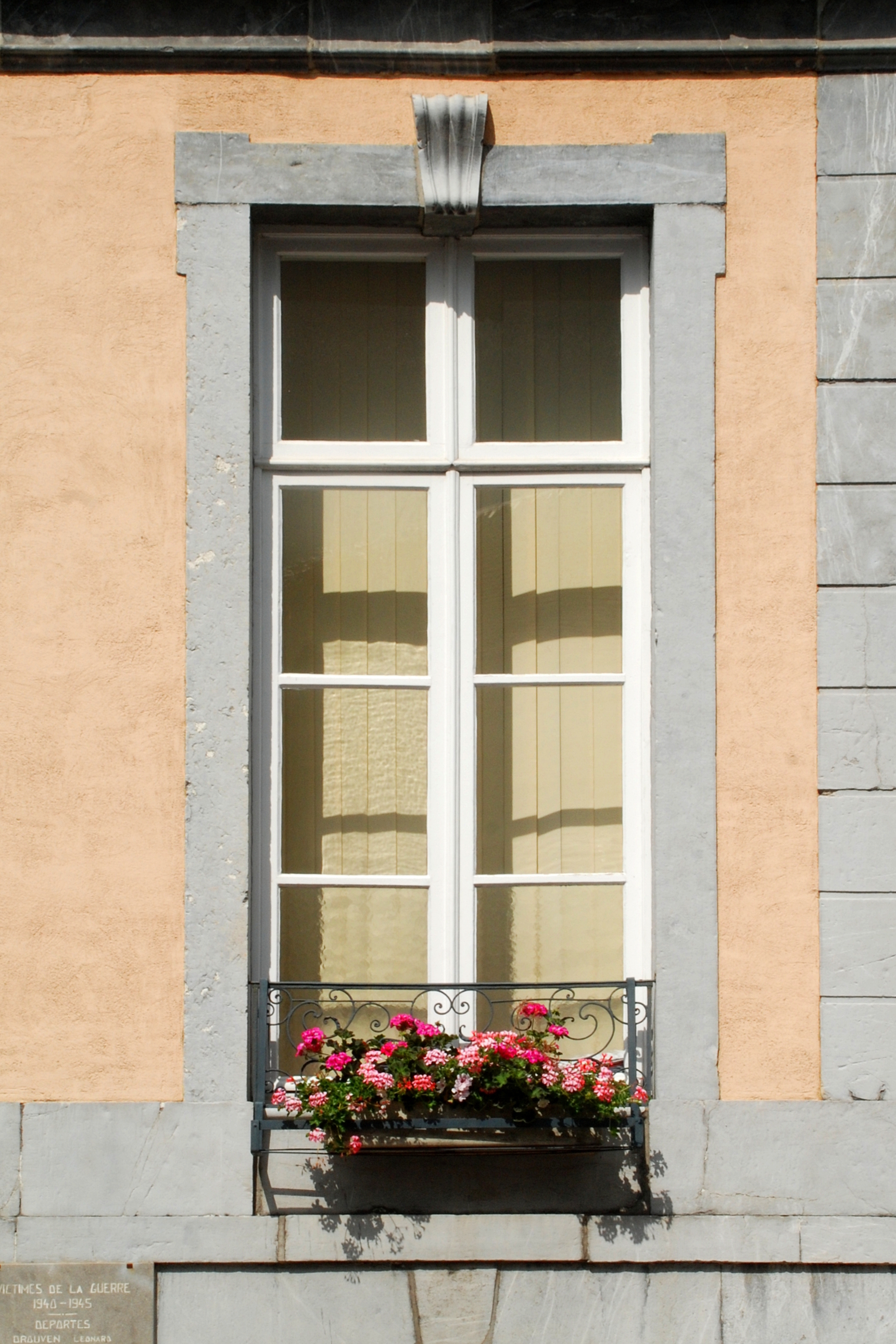 Belgique - Province de Liège - Hôtel de ville de Theux